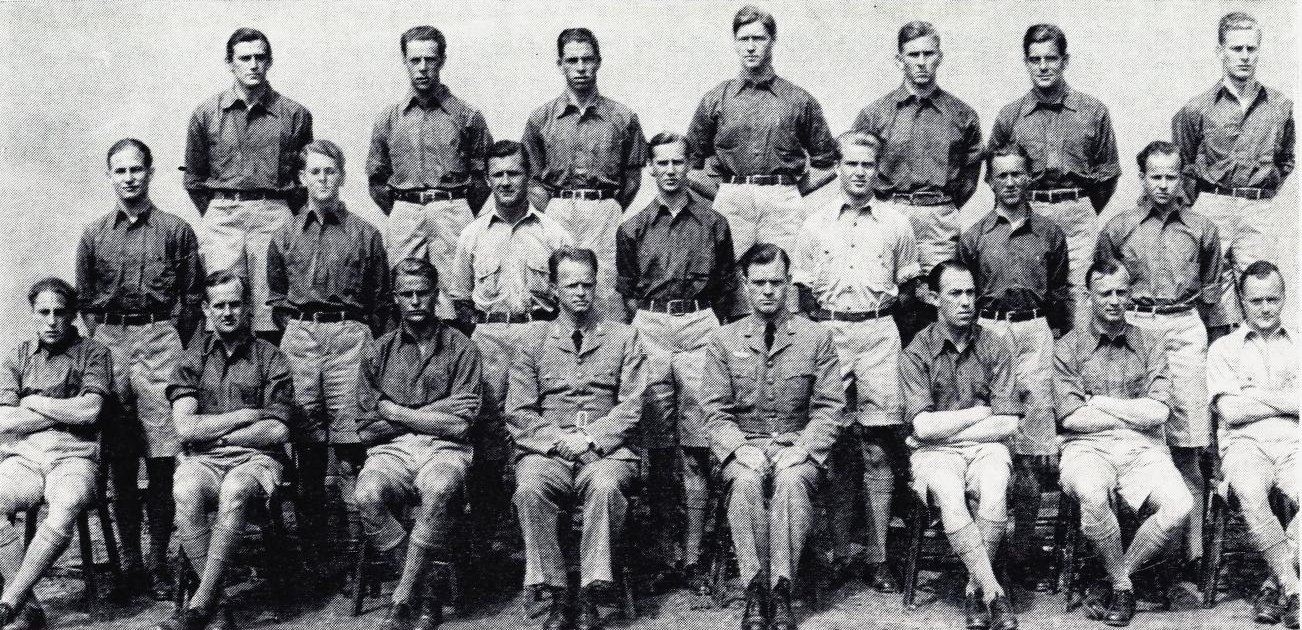 Hærens flyvåpen Kull II (Februar 1941-august 1941) Foran fra v: Bjørn Bjørnstad, Bjørn Ræder, Thorvald Johnsen, Jan Jørgensen, John Ryg, Erik Palm, Rolf Engelsen, Eirik Malm. Andre rad fra v: Hans Petter Gramnæs, Svein Nygaard, Guy Owren, Sigurd Jenssen, Marius Eriksen, Per Bergsland, Erik Westlye. Bak fra v: John Gilhuus, Yves de Castro Henrichsen, Erling Drangsholt, Finn Varde Jespersen, Jan Løfsgaard, Gunnar Fosse, Helner Grundt Spang.